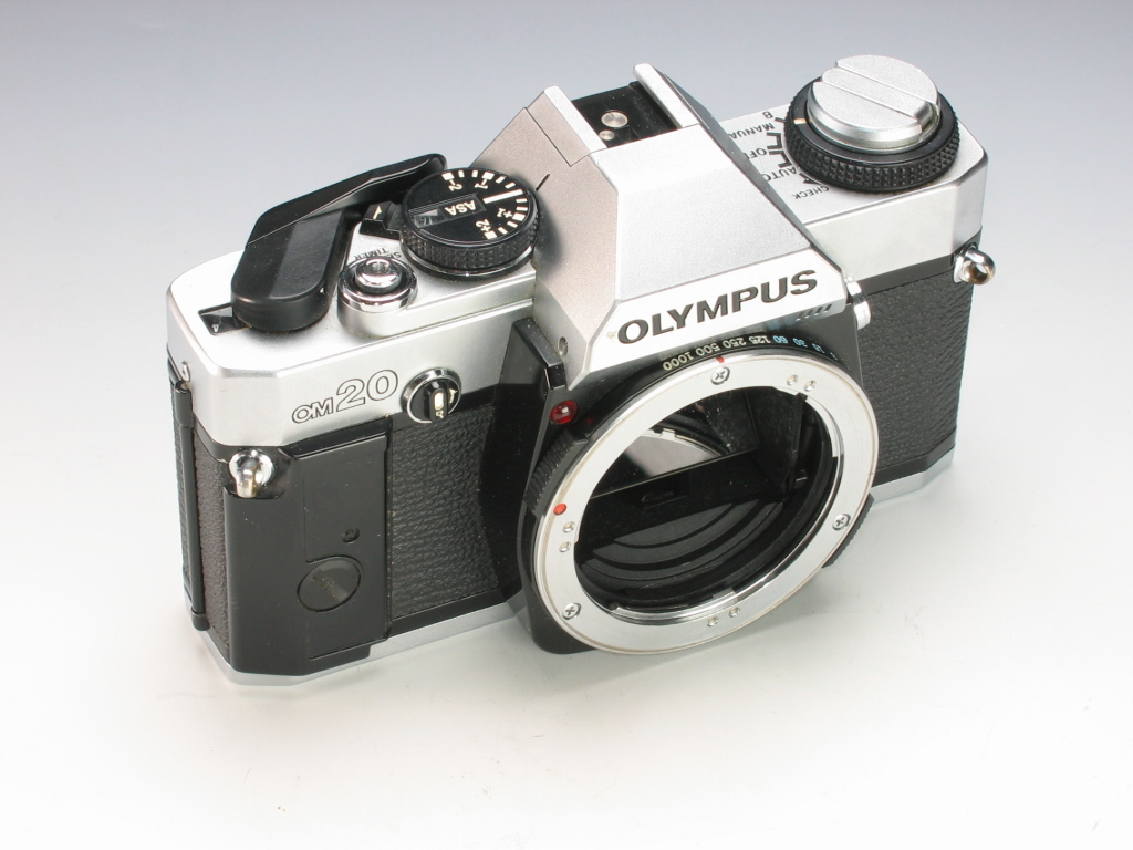 Olympus OM-20 without Lens